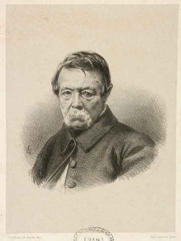 Lithographie ; 18 x 13,5 cm (au trait) ; 41,5 x 29 cm Numéro d'inventaire ENSBA : PC 19494 ; Achat : Mangin David d'Angers, Pierre-Jean (1788-1856)